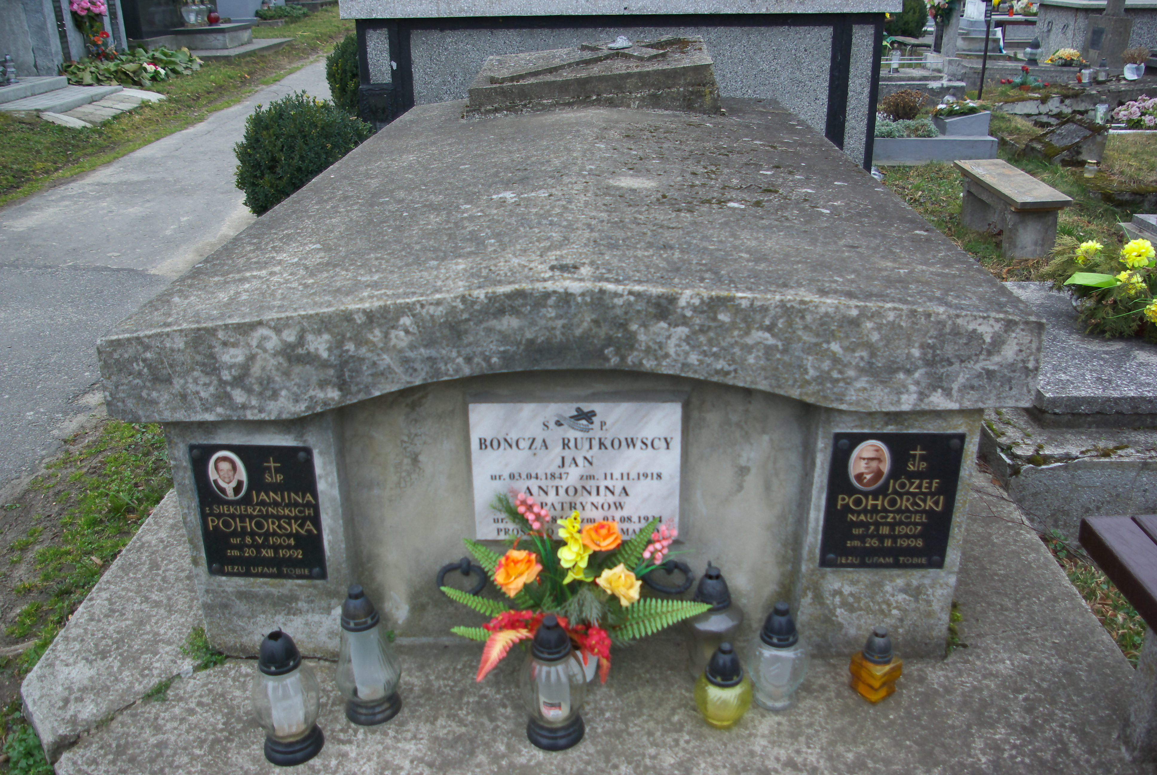 Grobowiec rodziny Pohorskich oraz Bończa Rutkowskich na Cmentarzu Centralnym w Sanoku